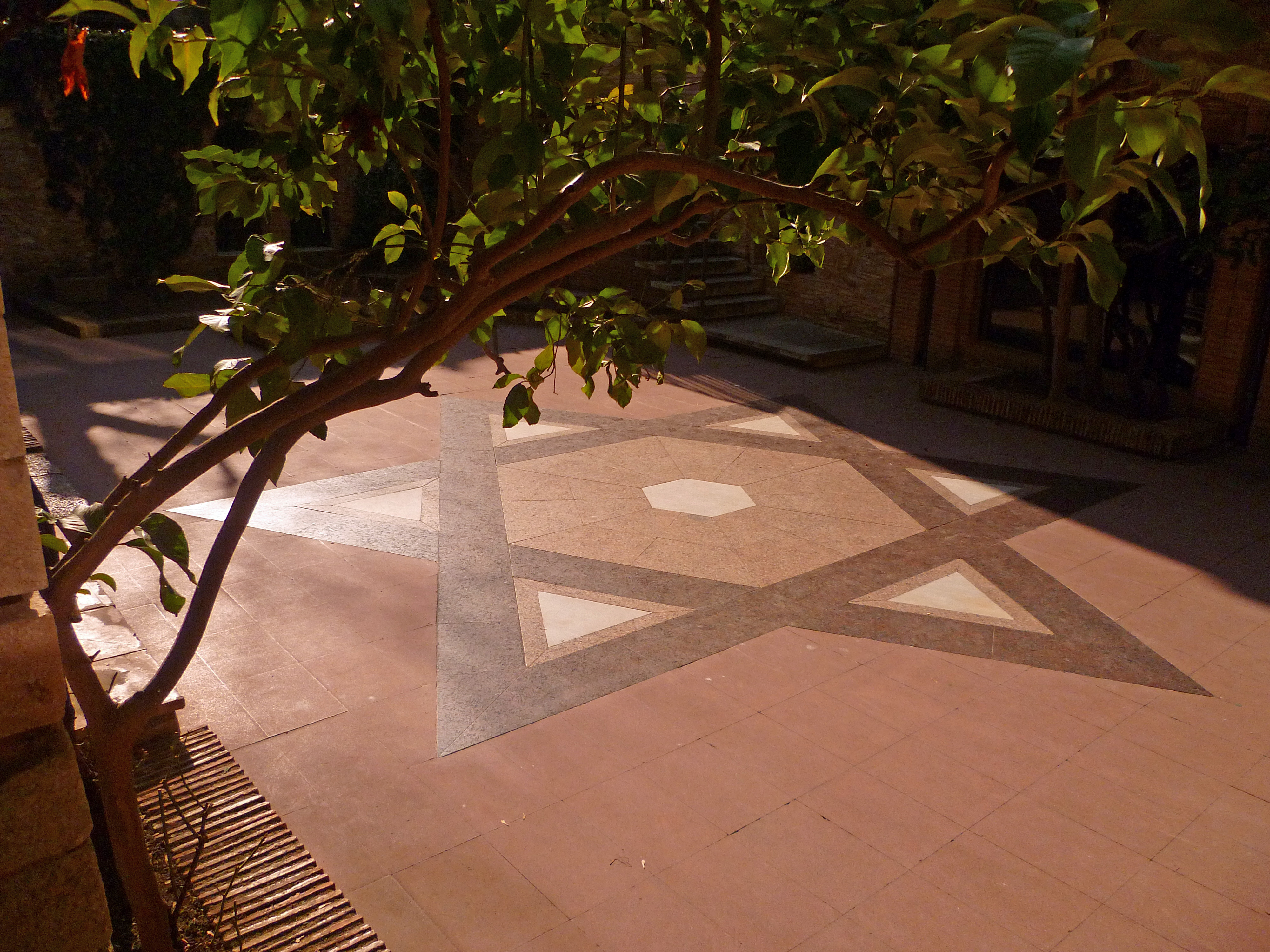 Girona : Dins el jardí del Museu d'Història dels Jueus.